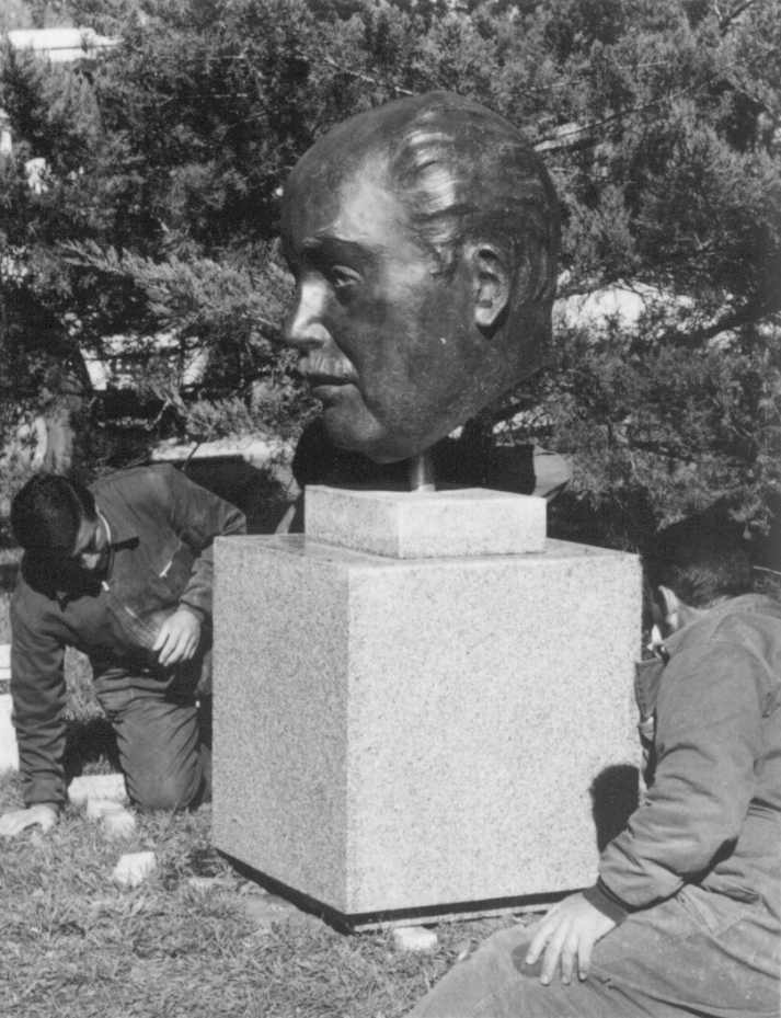 Monumento de Gonzalo Sanchez Mendizabal (La Universidad Complutense, Madrid)